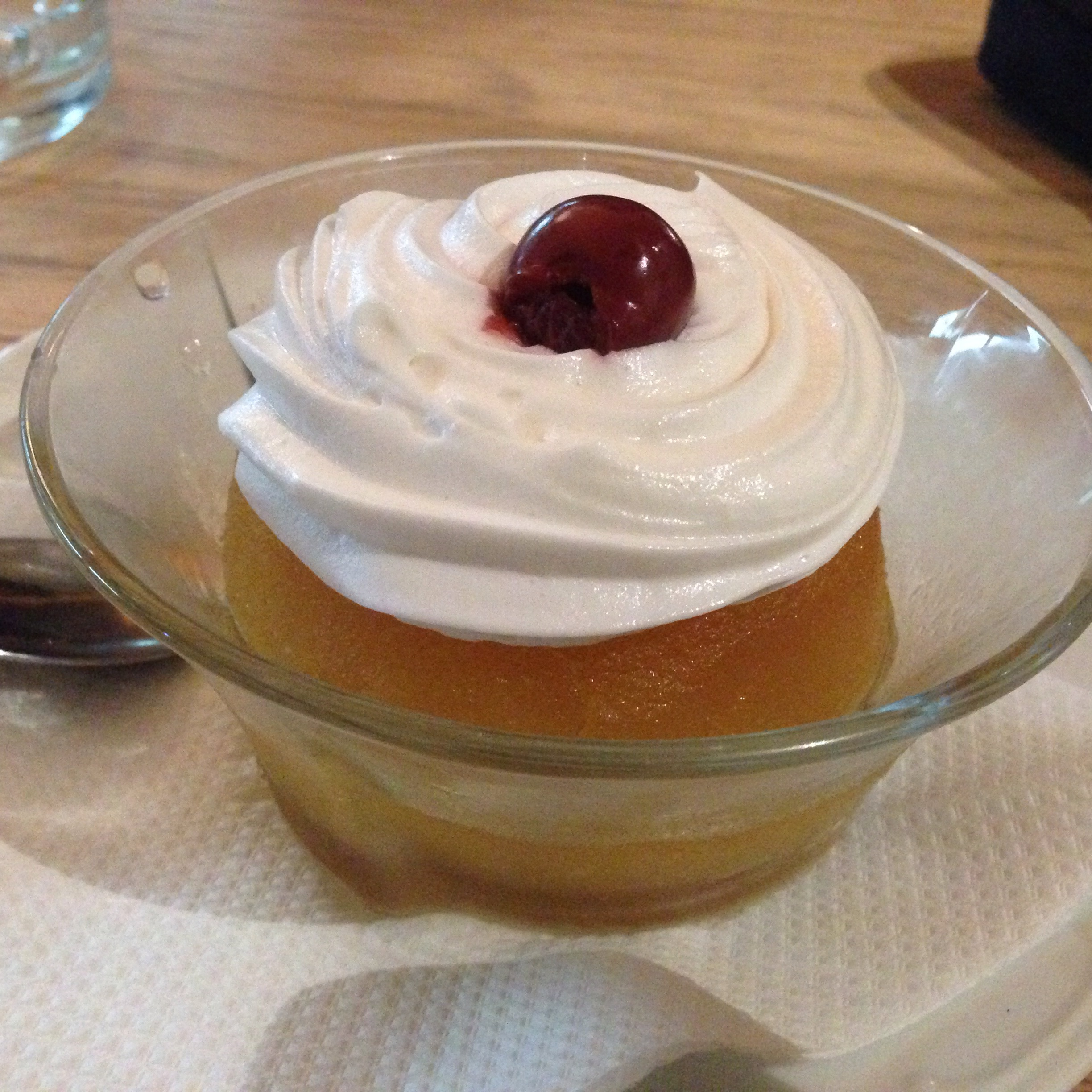 Sarajevo